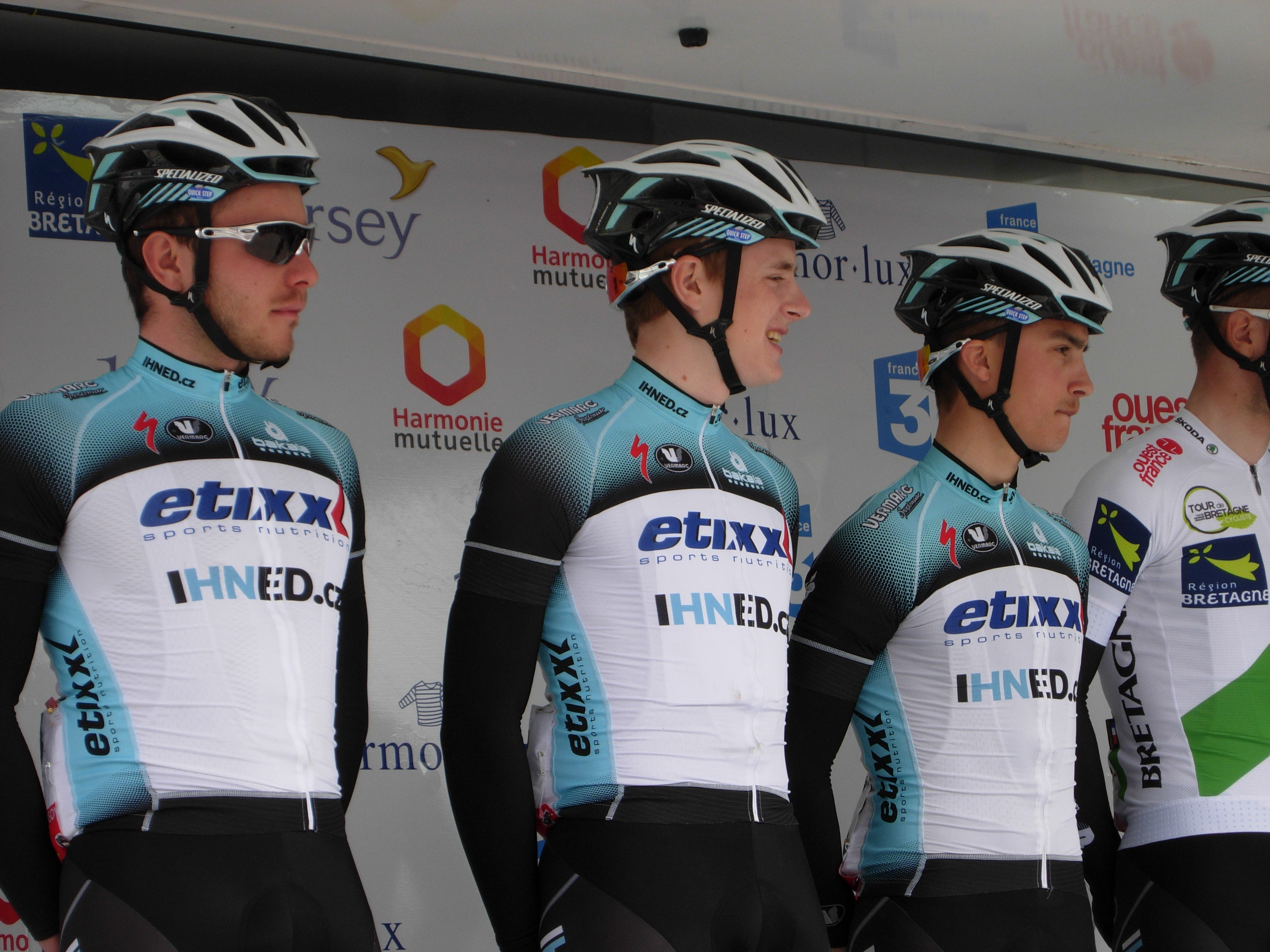 Tour de Bretagne 2013 - Présentation des équipes au départ de la deuxième étape à Ploemel - Équipe Etixx-iHNed Depicted people: Florian Sénéchal, Petr Vakoč and Julian Alaphilippe